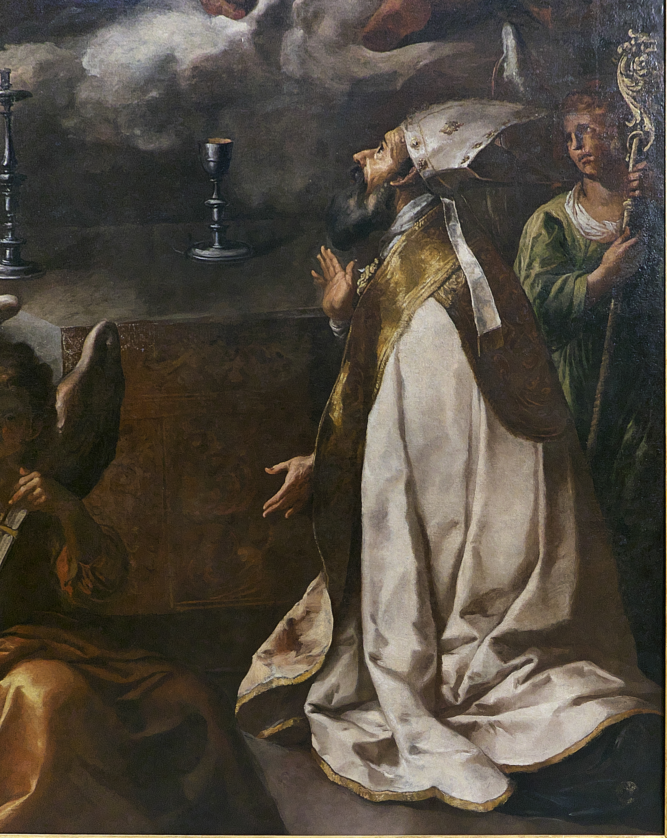 San Basilio en la pintura Visión de San Basilio de Francisco de Herrera el Viejo (1638-1639), Museo de Bellas Artes de Sevilla.